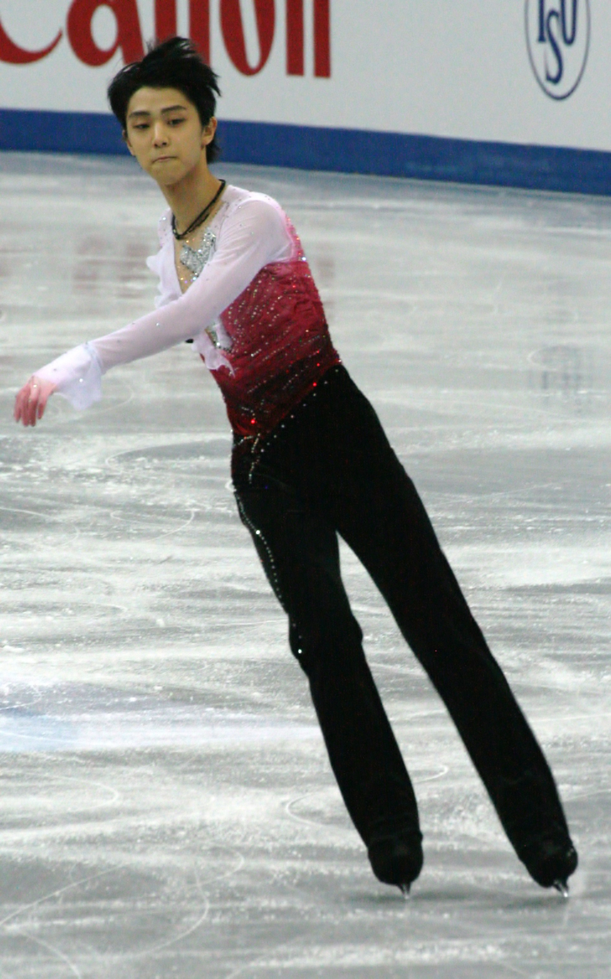 Юдзуру Ханю (Япония) на на финале Гран-при 2012-2013. Произвольная программа.